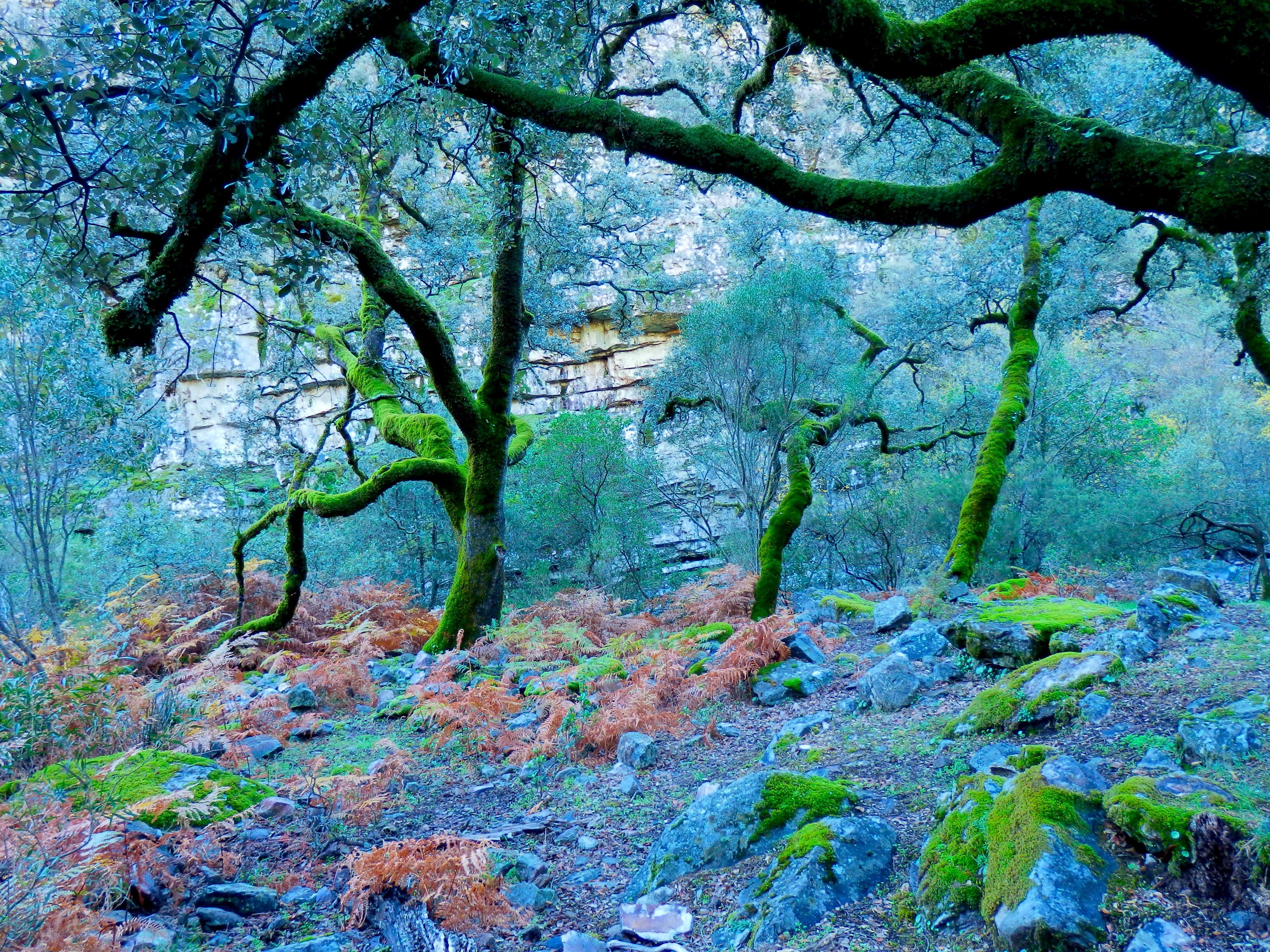 Fondo del valle